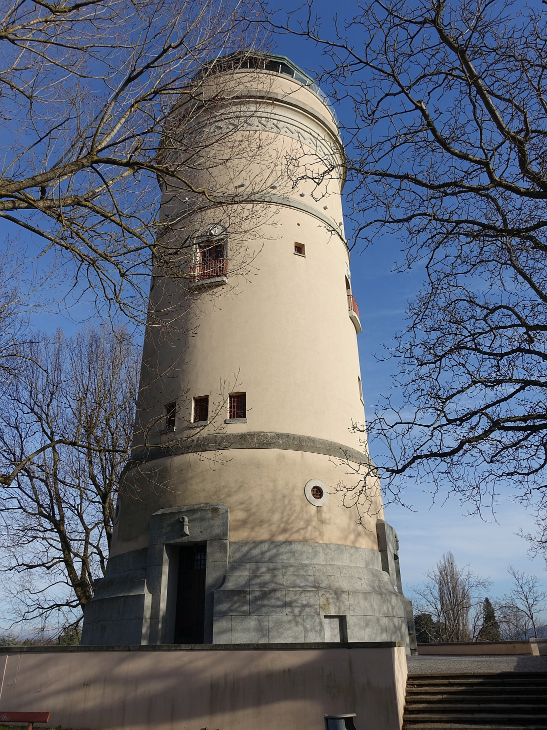 Der Wasserturm auf dem Bruderholz hat eine begehbare 360 Grad, Aussichtsplattform